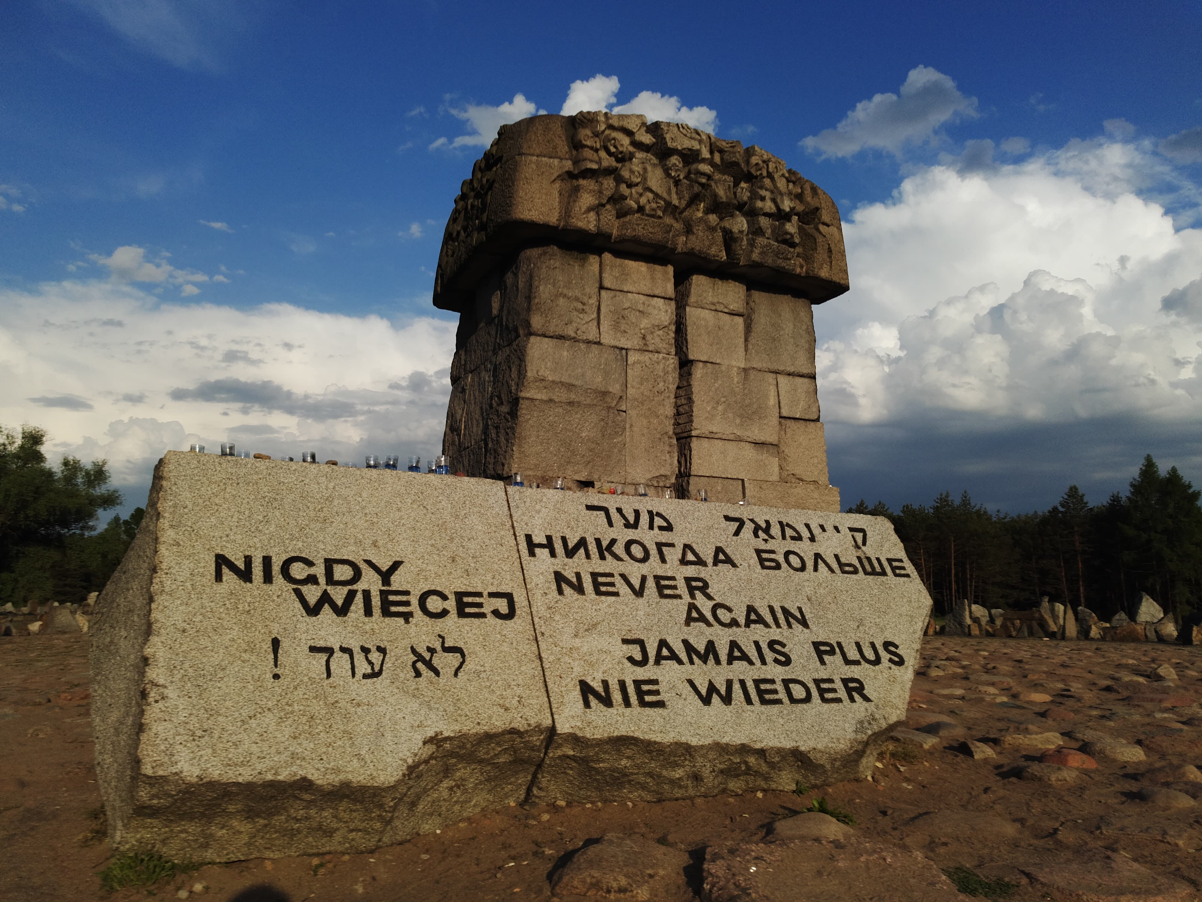 Kosów Lacki, Obóz zagłady w Treblince Wikidata has entry Q152010 with data related to this item.